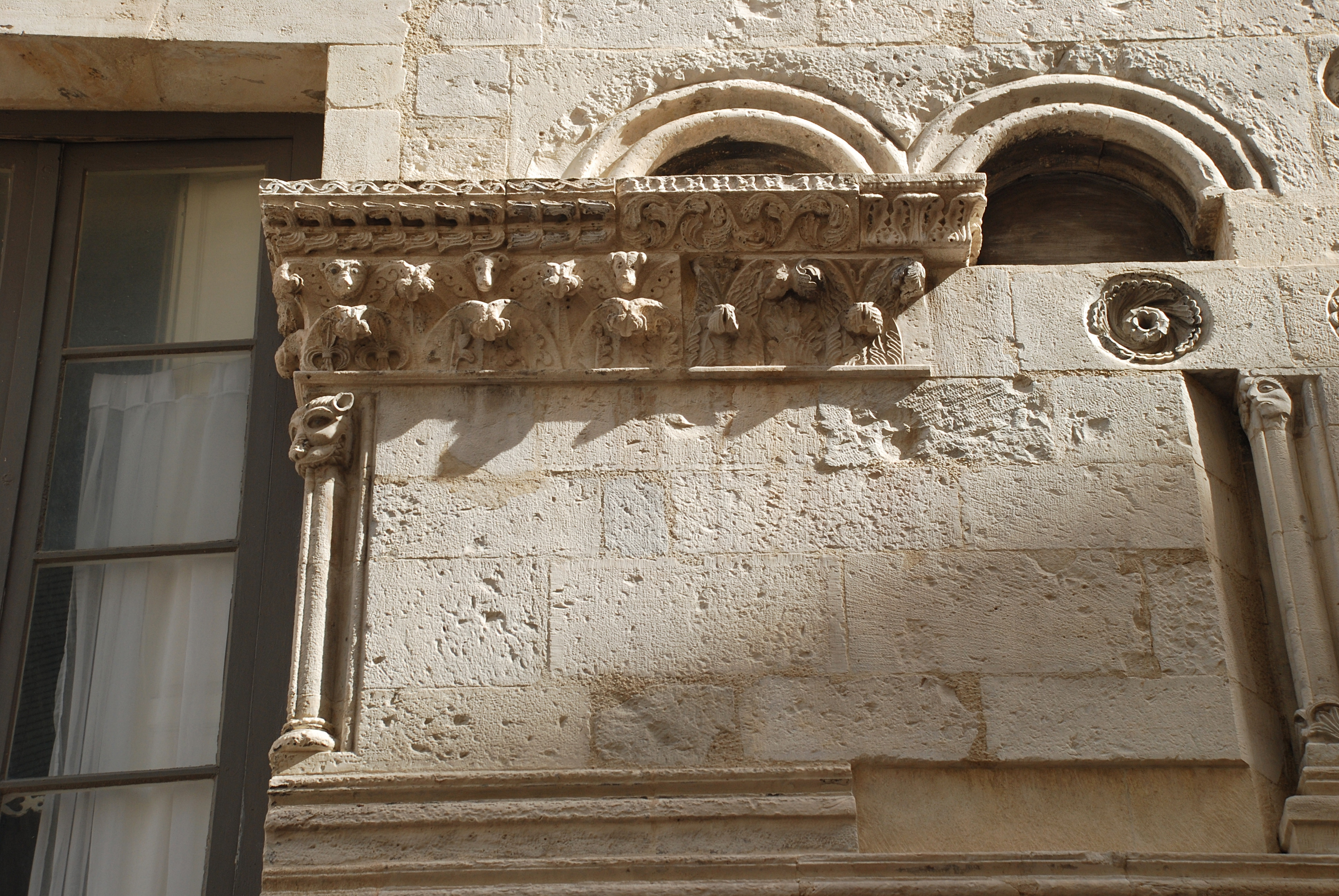 France - Provence - Maison romane de Nîmes